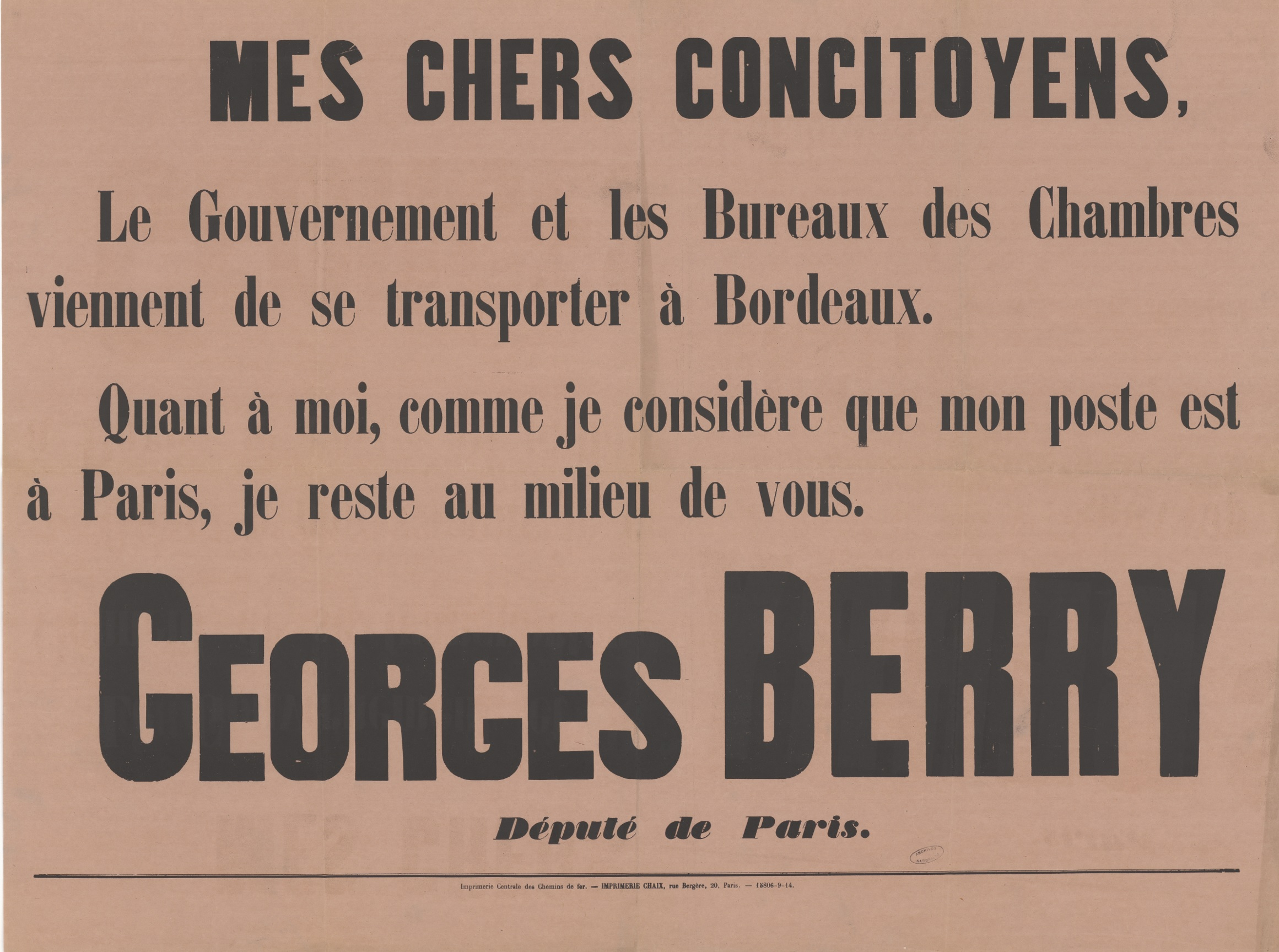 Message de Georges Berry, député de la Seine, aux habitants de sa circonscription, affiche, septembre 1914